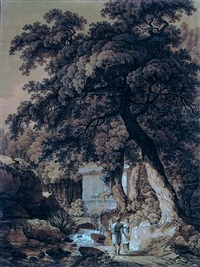 Картина Гендриха Божидара Велы (1778-1805)